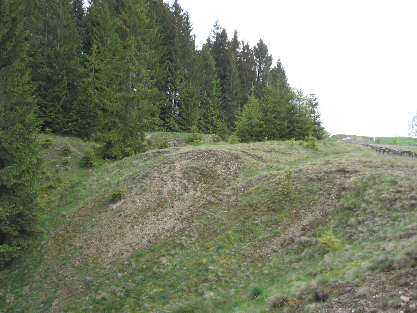 Naturschutzgebiet „Bleikuhlen“ (NSG HSK-387) in Marsberg